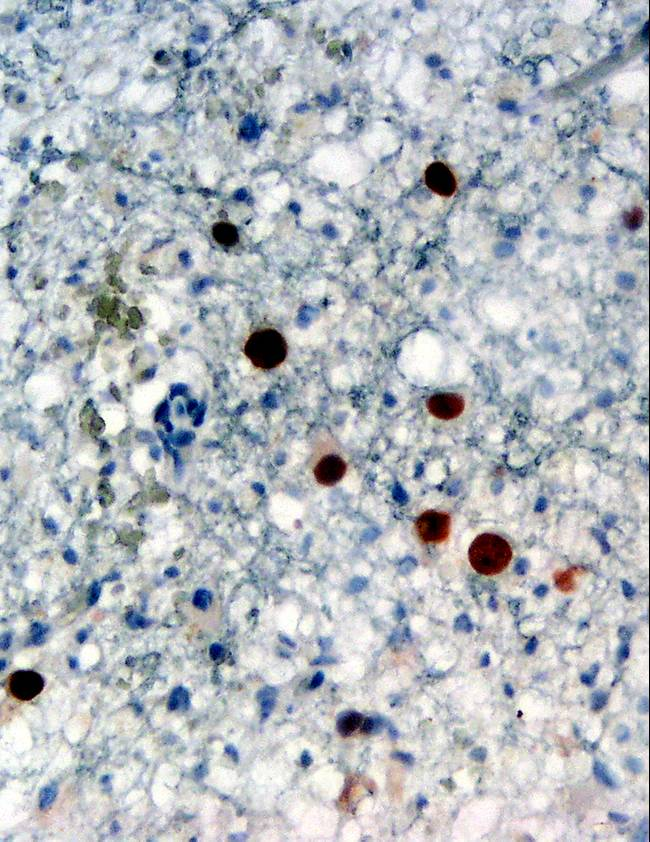 Immunhistochemischer Nachweis von JC-Virusprotein (braun angefärbt) in einer Hirnbiopsie (infizierte Gliazellen bei PML)